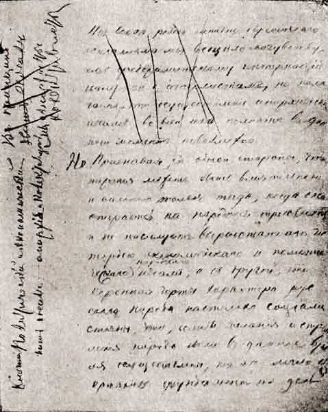 Bozza della prima pagina del programma di Zemlja i Volja riscritto da Aleksej Dmitrievič Obolešev. Maggio 1878